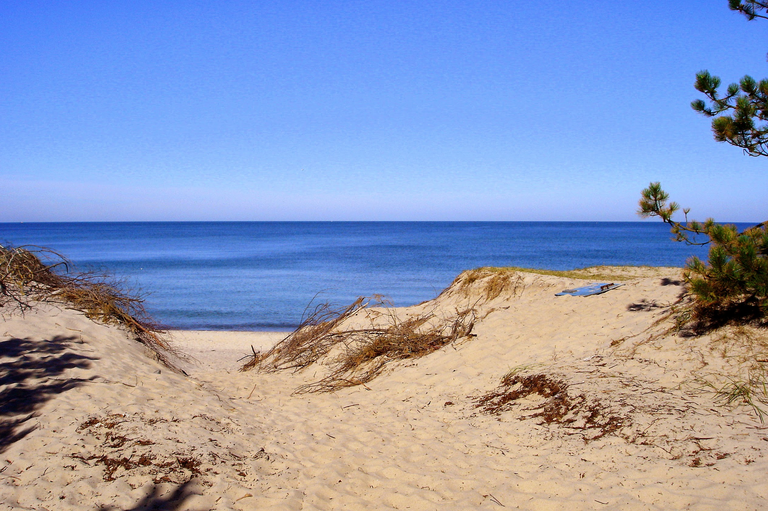 Wicie beach, Poland